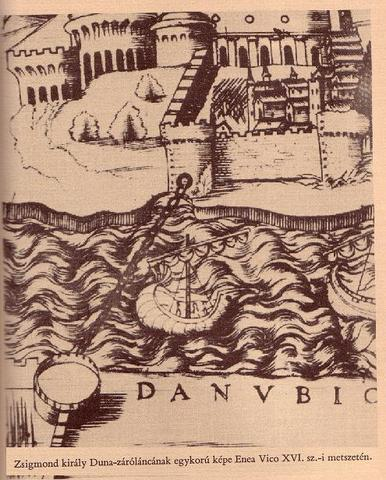 Siege of_Pest Enea Vico 1542